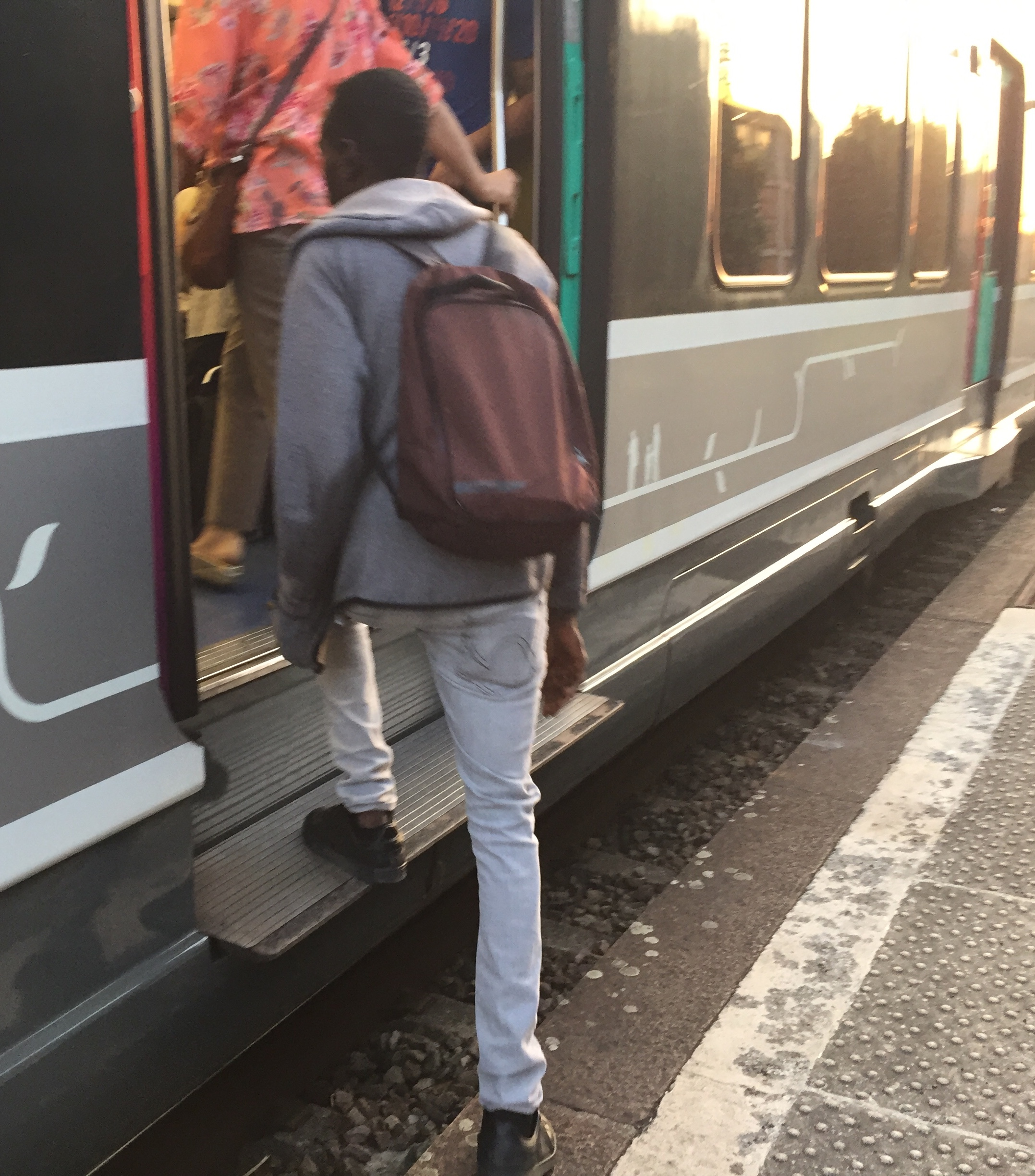 Les quais bas des voies directes (non utilisées en temps normal pour le RER B) à la gare de La Courneuve - Aubervilliers durant l'été 2018.